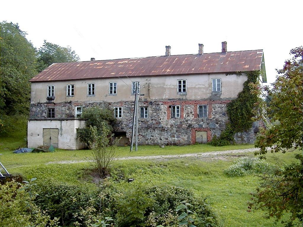 Nītaures dzirnavas 2000-08-19